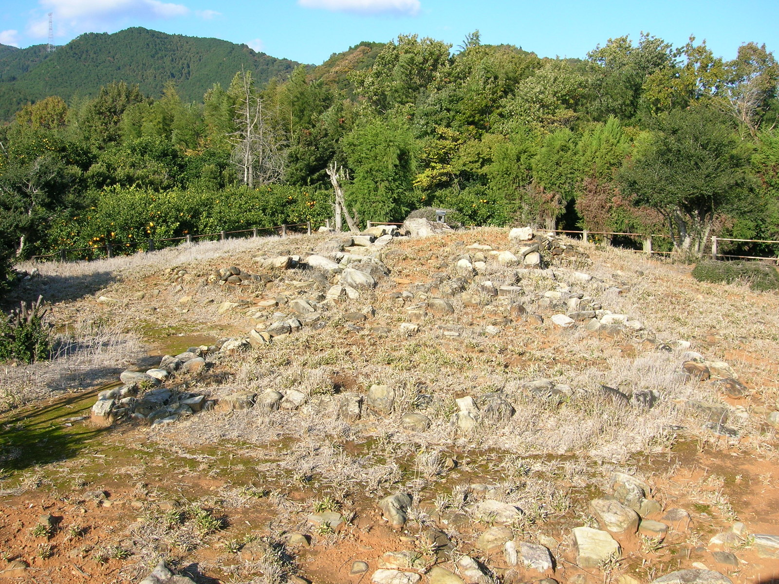 Sumiyakibira kofun-gun (Sumiyakibira kofun group), No.4 tomb. Loc: Toyokawa city, Aichi Prefecture, Japan. 炭焼平古墳群・4号墳 撮影場所 愛知県豊川市